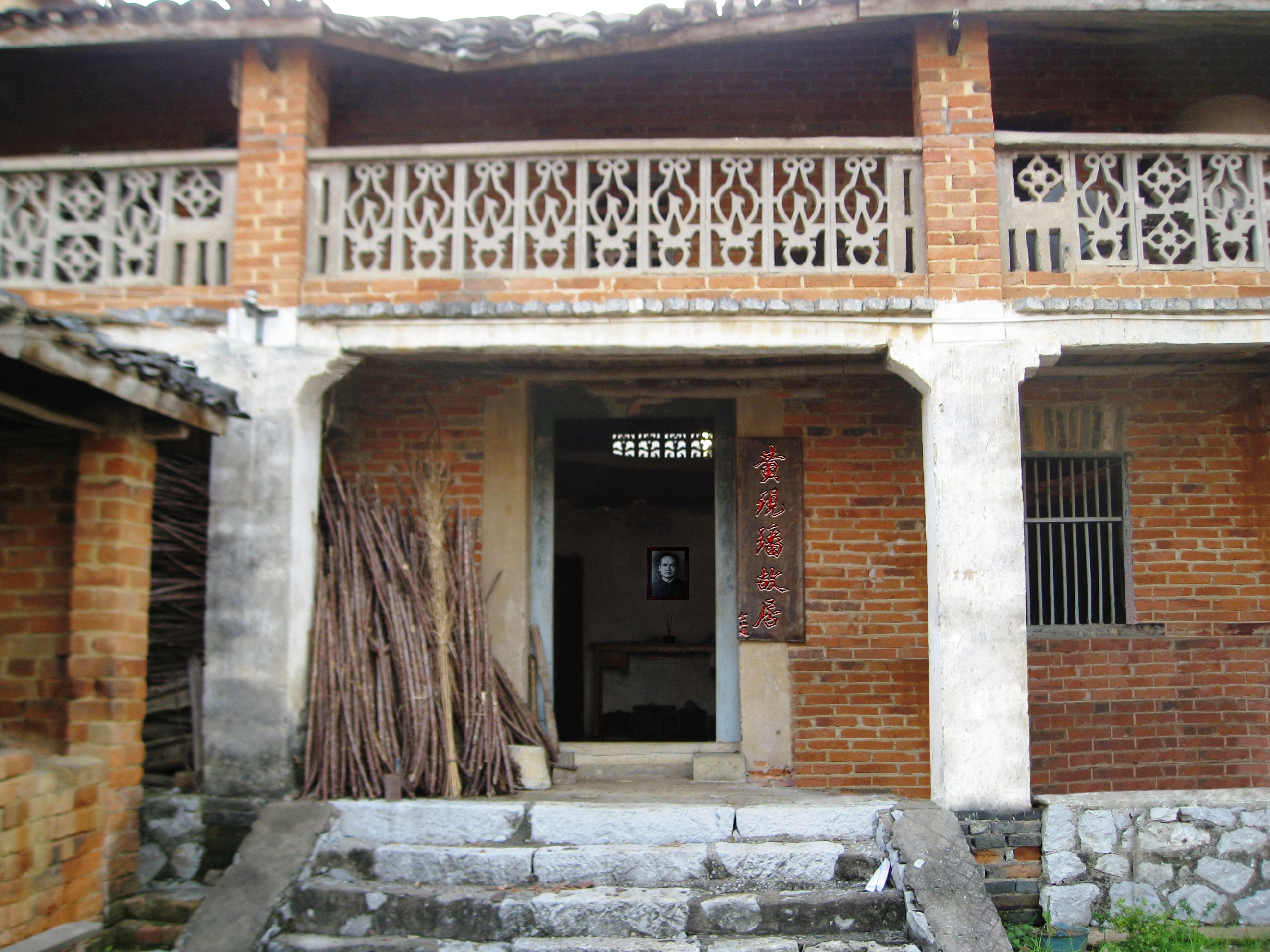 Vahcuengh: Aen ranzgaeuq Vangz Yenfanh